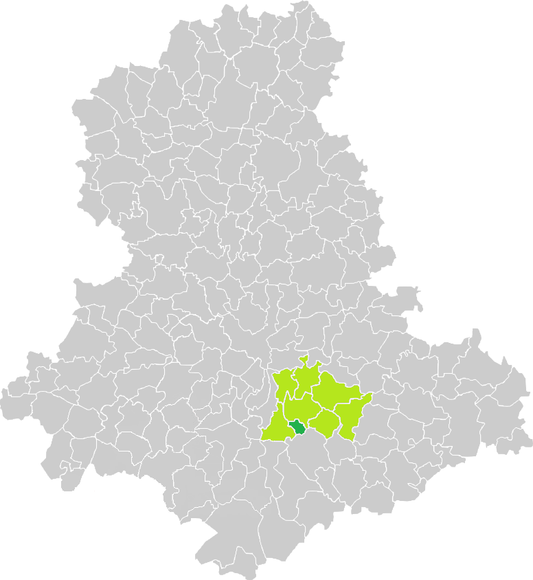 Carte de situation de la commune de Pierre-Buffière (en vert foncé) dans le votre Canton (en vert clair) sur une carte des communes de la Haute-Vienne